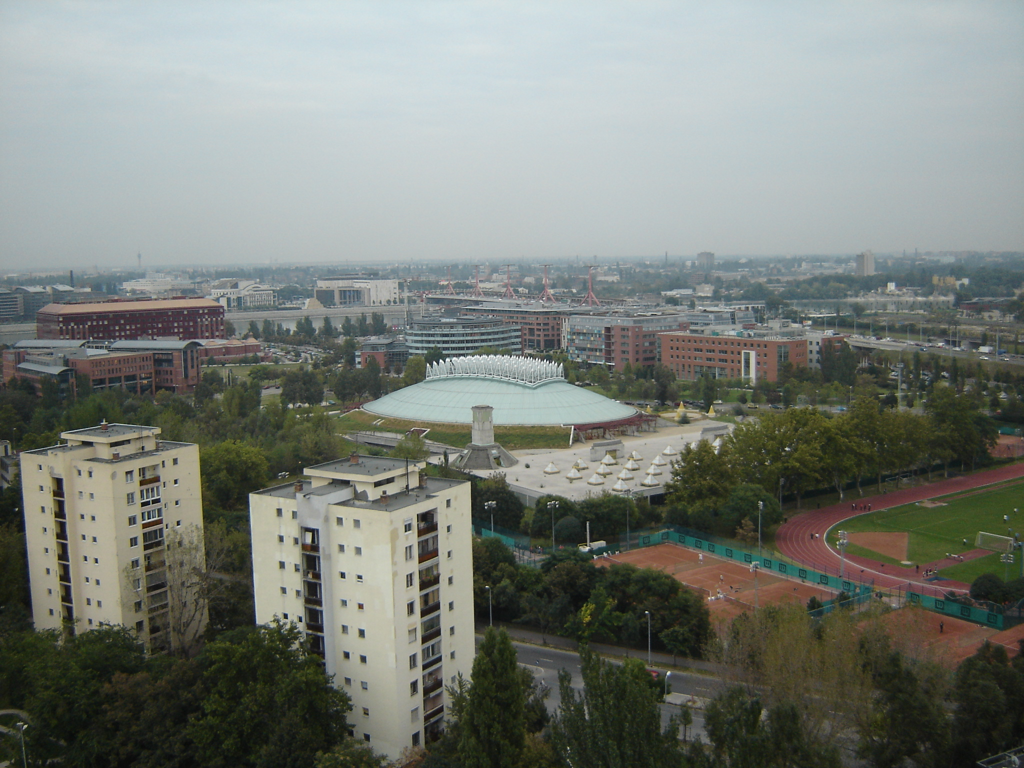 Előtérben a Lágymányosi lakótelep és a BEAC sporttelep, háttérben az ELTE déli, a BME informatikai épülete, valamint az Infopark és a Lágymányosi híd (Budapest)